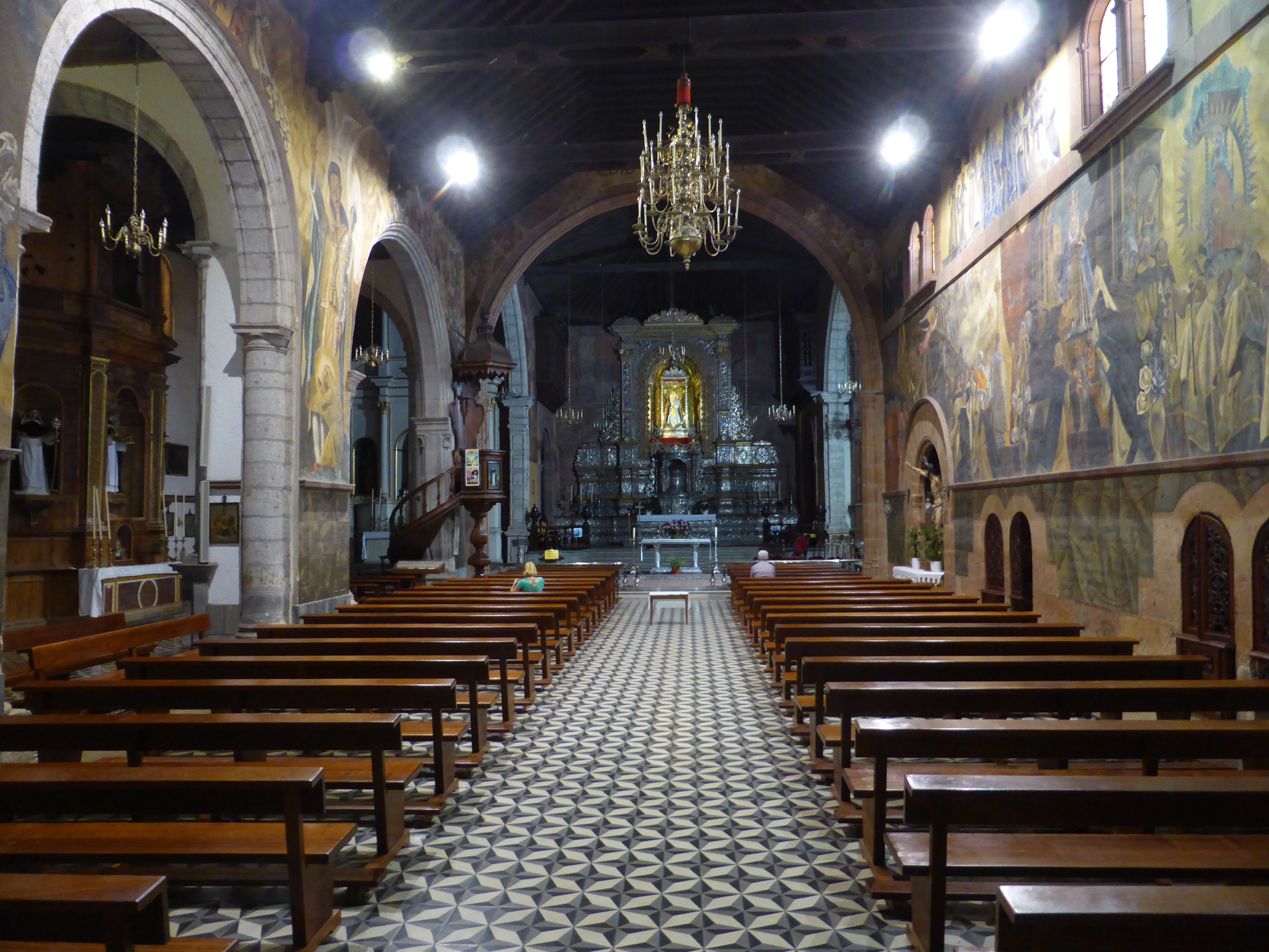 Interior de la iglesia de Santo Domingo de Guzmán (San Cristóbal de La Laguna). Construcción del siglo XVI, hacia el año 1527. En cambio, las pinturas murales son del siglo XX.